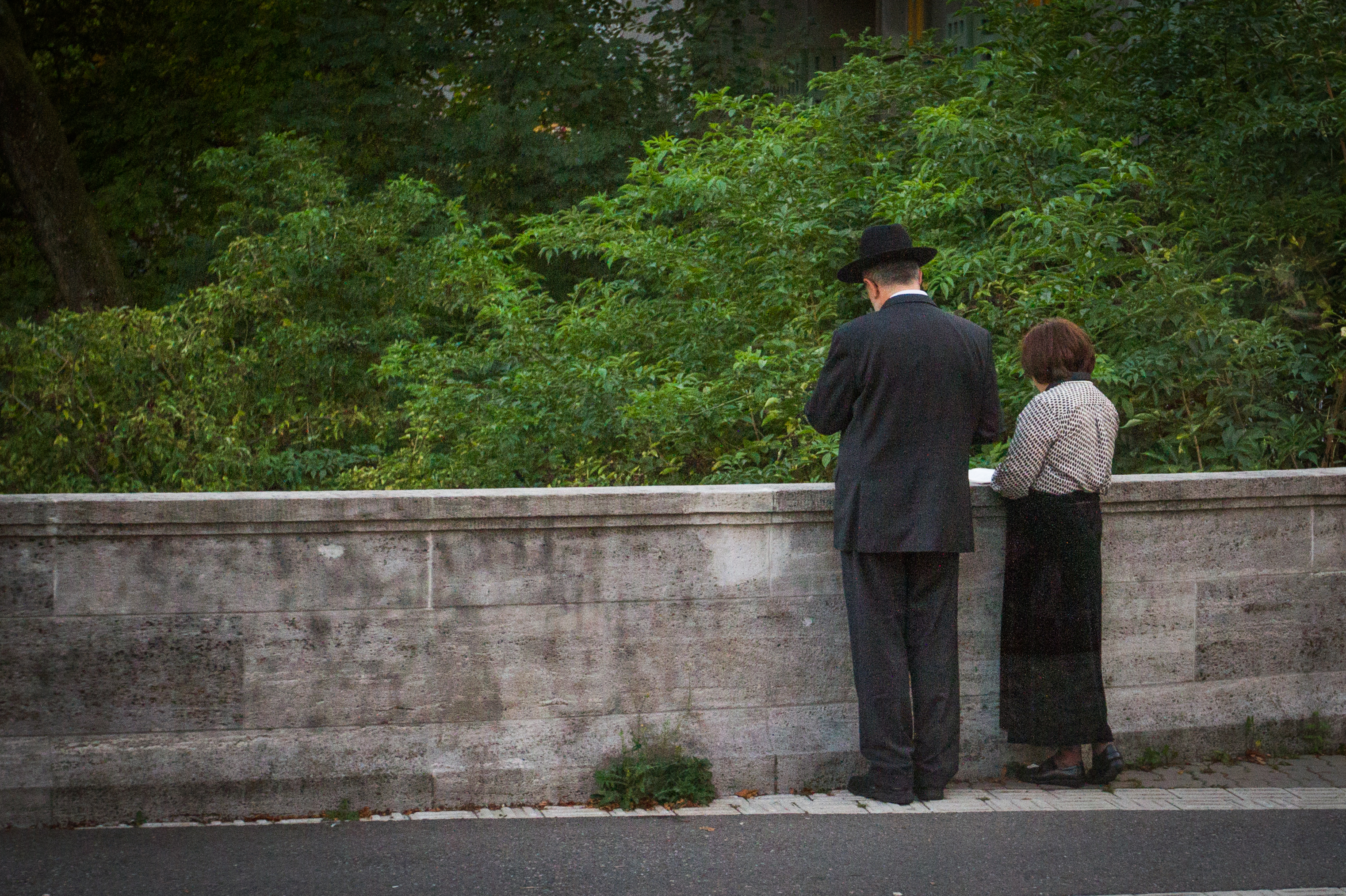 Le tashlikh (hébreu תשליך, « Tu enverras [au loin] ») est une coutume juive d'origine ancienne. Elle est pratiquée l'après-midi de Rosh Hashana (le Nouvel An civil selon le calendrier hébraïque). Les péchés de l'année écoulée sont symboliquement « envoyés », en jetant des bouts de pain, dans une rivière, un lac, la mer, l'océan, ou tout point d'eau courante, naturel de préférence.